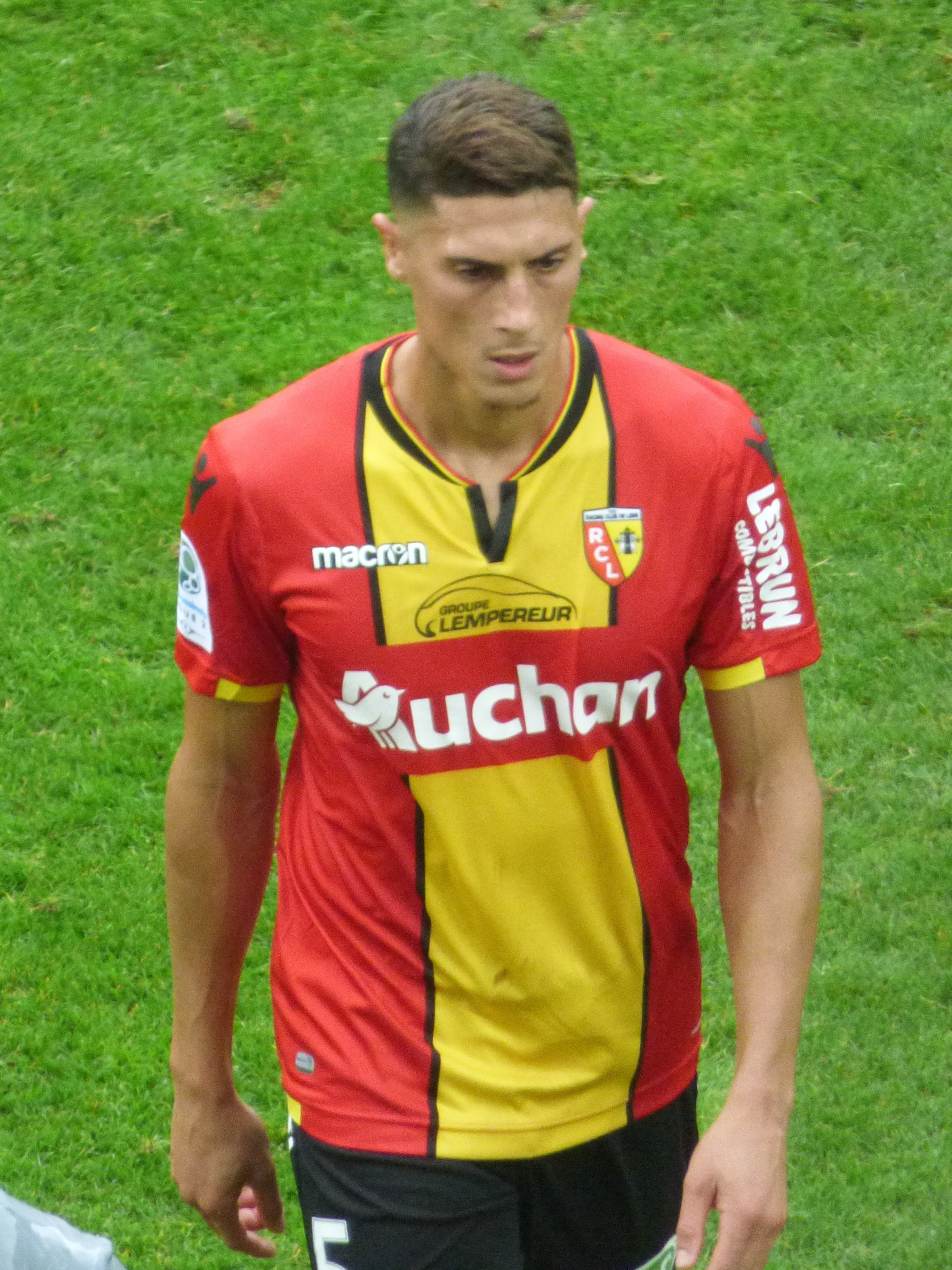 Mehdi Tahrat lors du match Lens / Sochaux, comptant pour la septième journée du championnat de France de football de Ligue 2, le 15 septembre 2018.